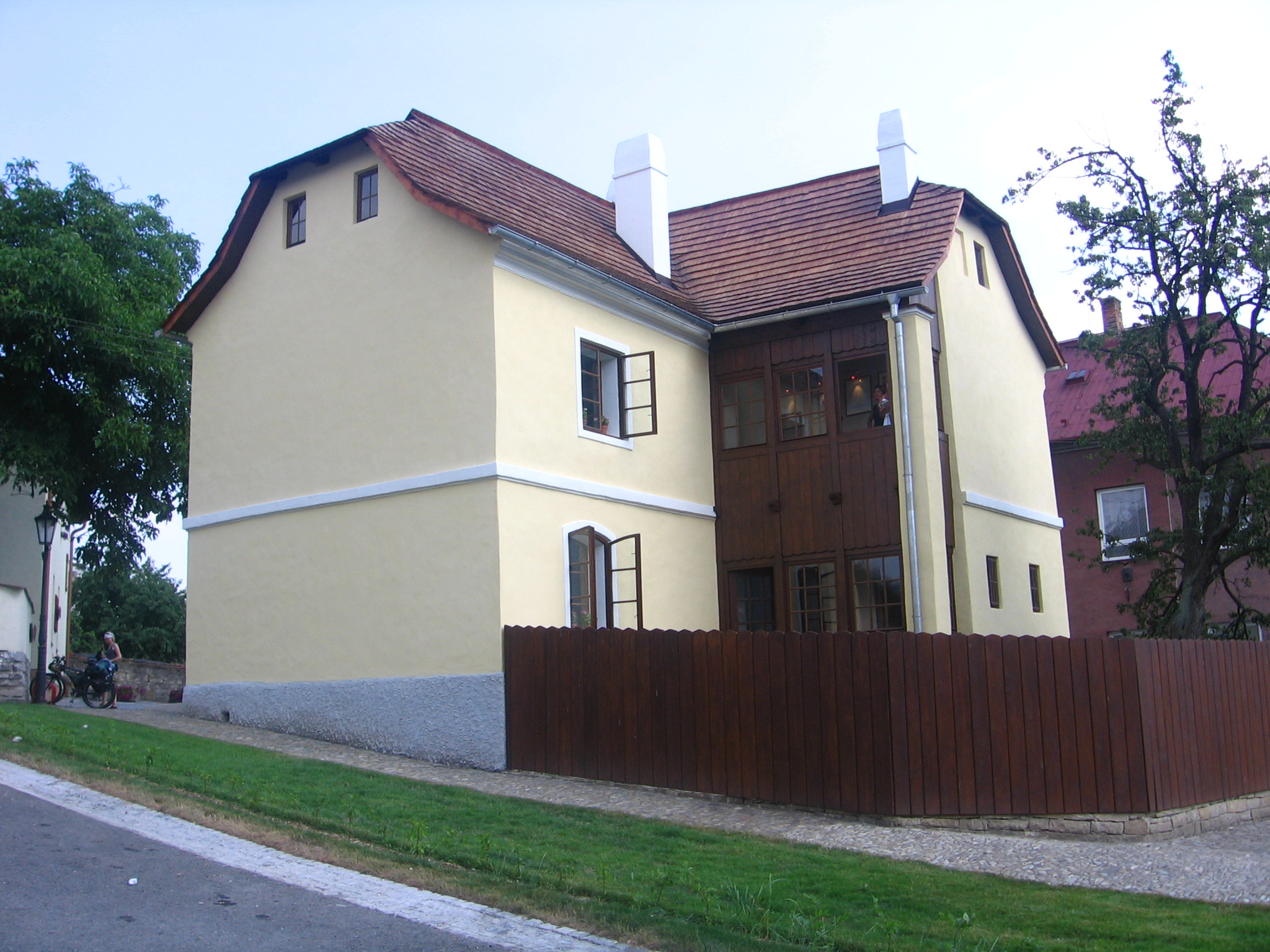 Rodný dům Sigmunda Freuda v Příboře.